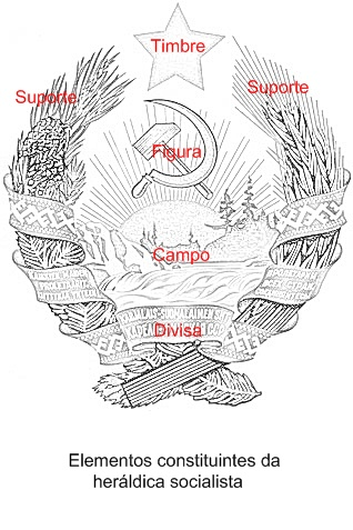 Elementos da Herráldica Socialista